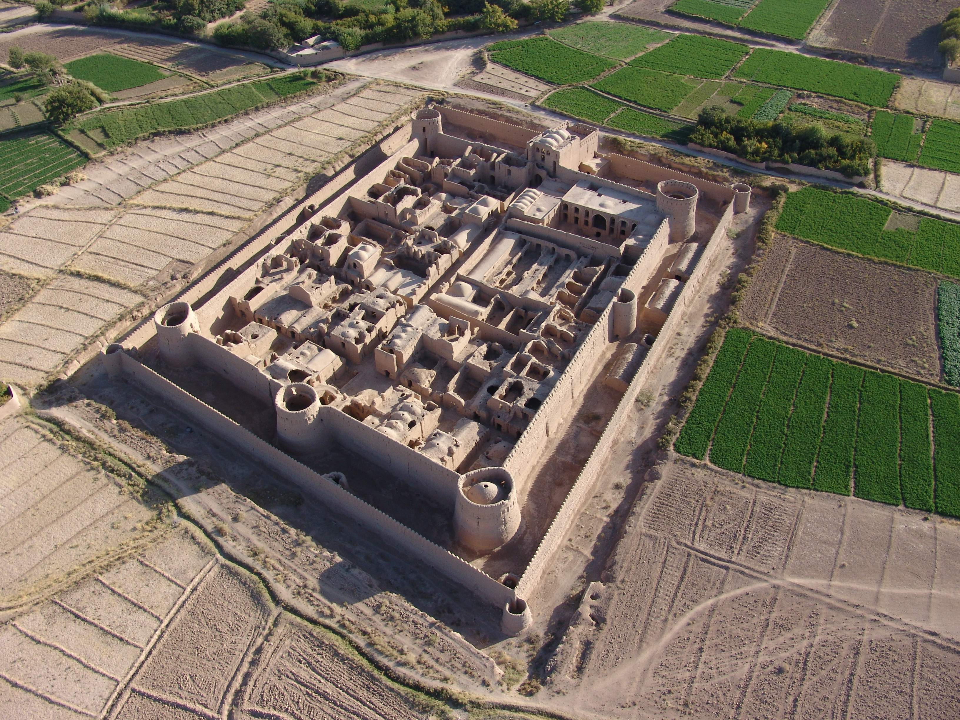 این قلعه تاریخی در 25 کیلومتری شهر یزد و در شهر مهریز واقع گردیده